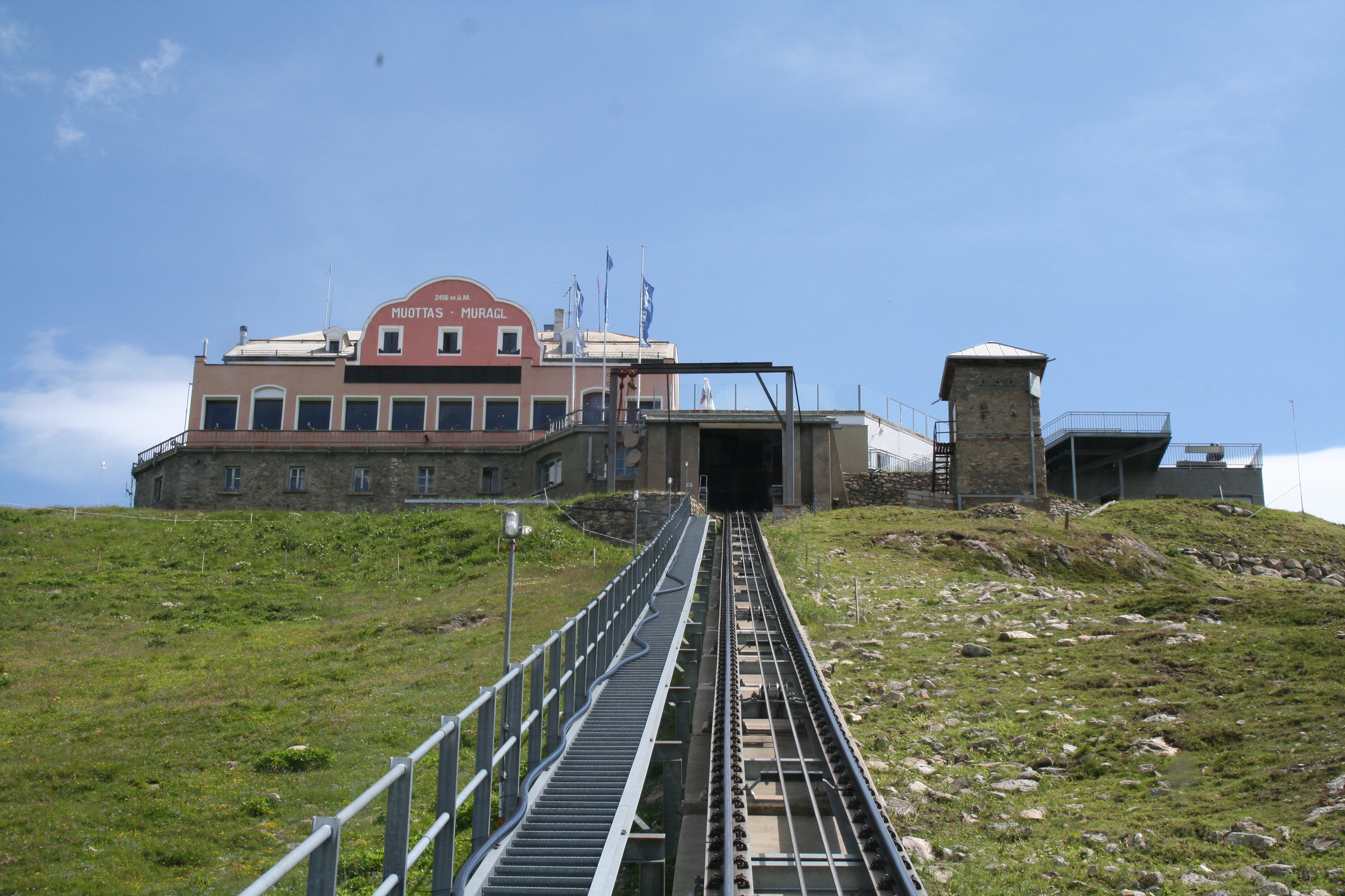 Muottas Muragl Ansicht von Süden